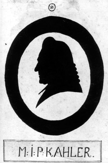 Johann Philipp Kahler (1726-1792), deutscher lutherischer Theologe (Silhouette)